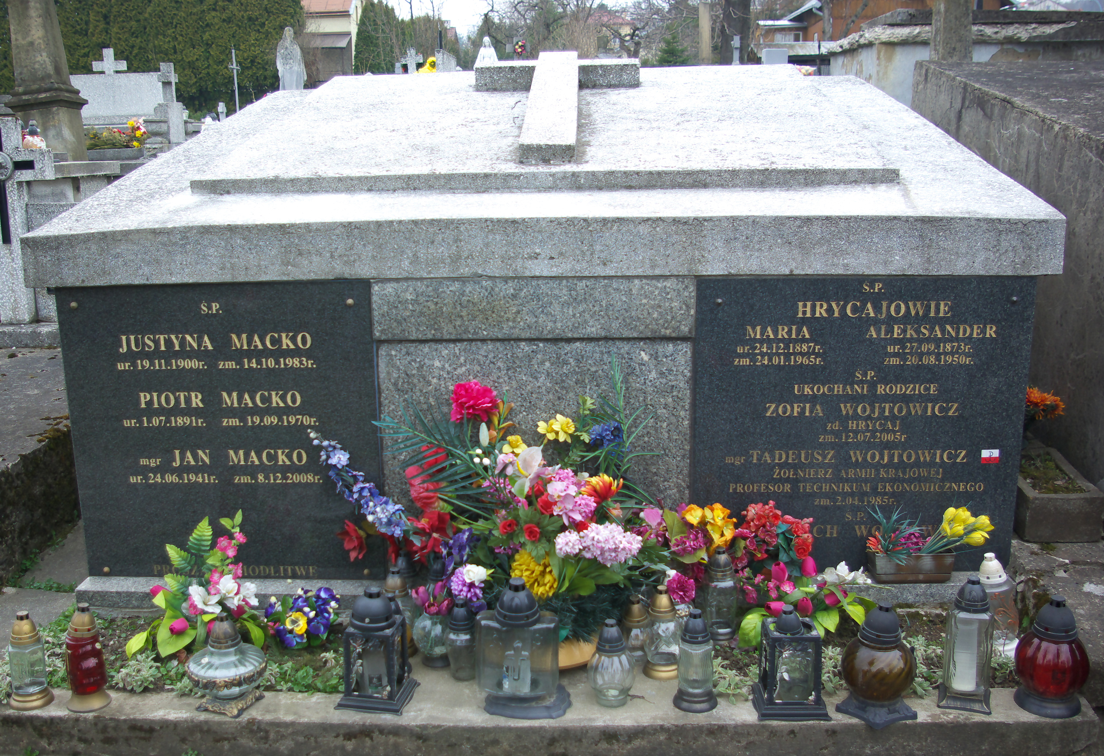 Grobowiec rodzin Hrycaj, Macko i Wojtowicz na Cmentarzu Centralnym w Sanoku.